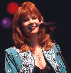 Patty Loveless, Live-Foto